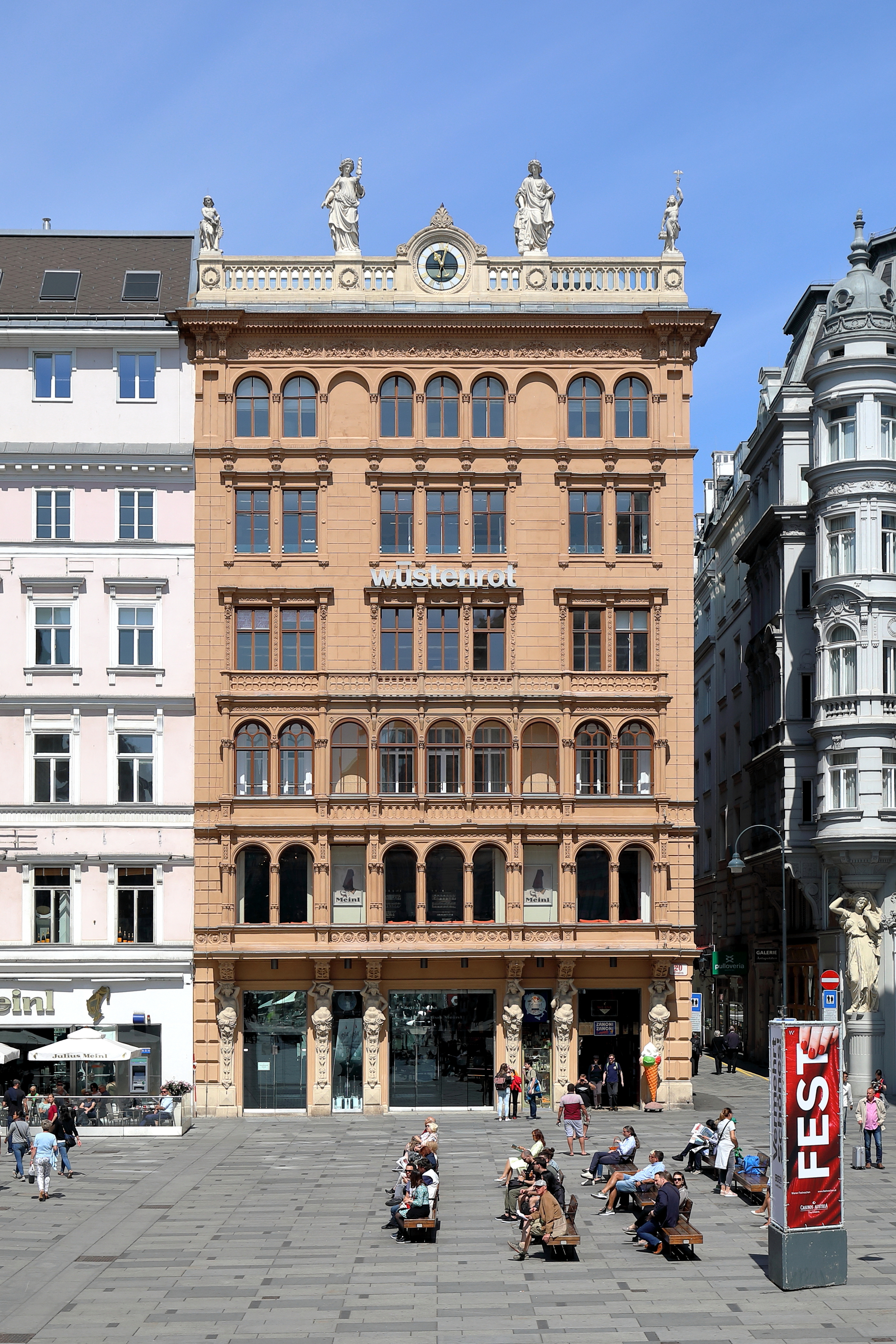 Das Eckhaus an der Adresse Graben 20 / Naglergasse 1 im 1. Wiener Gemeindebezirk Innere Stadt.Das Gebäude an der Stirnseite des Grabens wird auch als „Haus Liebig“ und „Julius Meinl am Graben“ bezeichnet. Es wurde im frühhistoristischen Stil im Auftrag von Johann Liebieg (1802–1870) nach Pläne des Architekten Ferdinand Fellner der Ältere von 1857 bis 1858 errichtet.